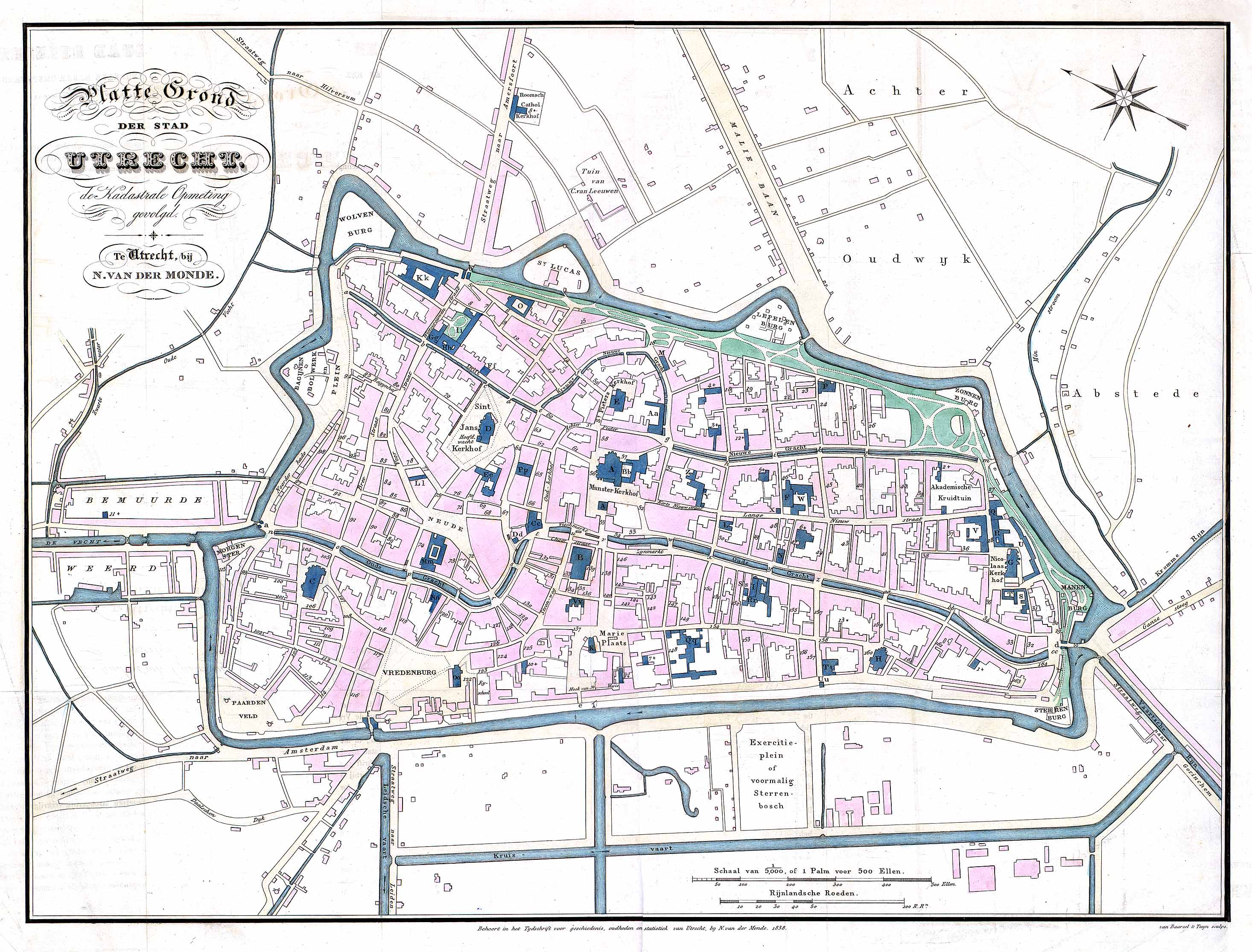 Plattegrond stad Utrecht door Van der Monde in 1838. Zie voor de nummers en letters die in de kaart straten etcetera aanduiden. Tijdschrift voor geschiedenis, oudheden en statistiek van Utrecht bij Van der Monde, op blz. 346 en verder